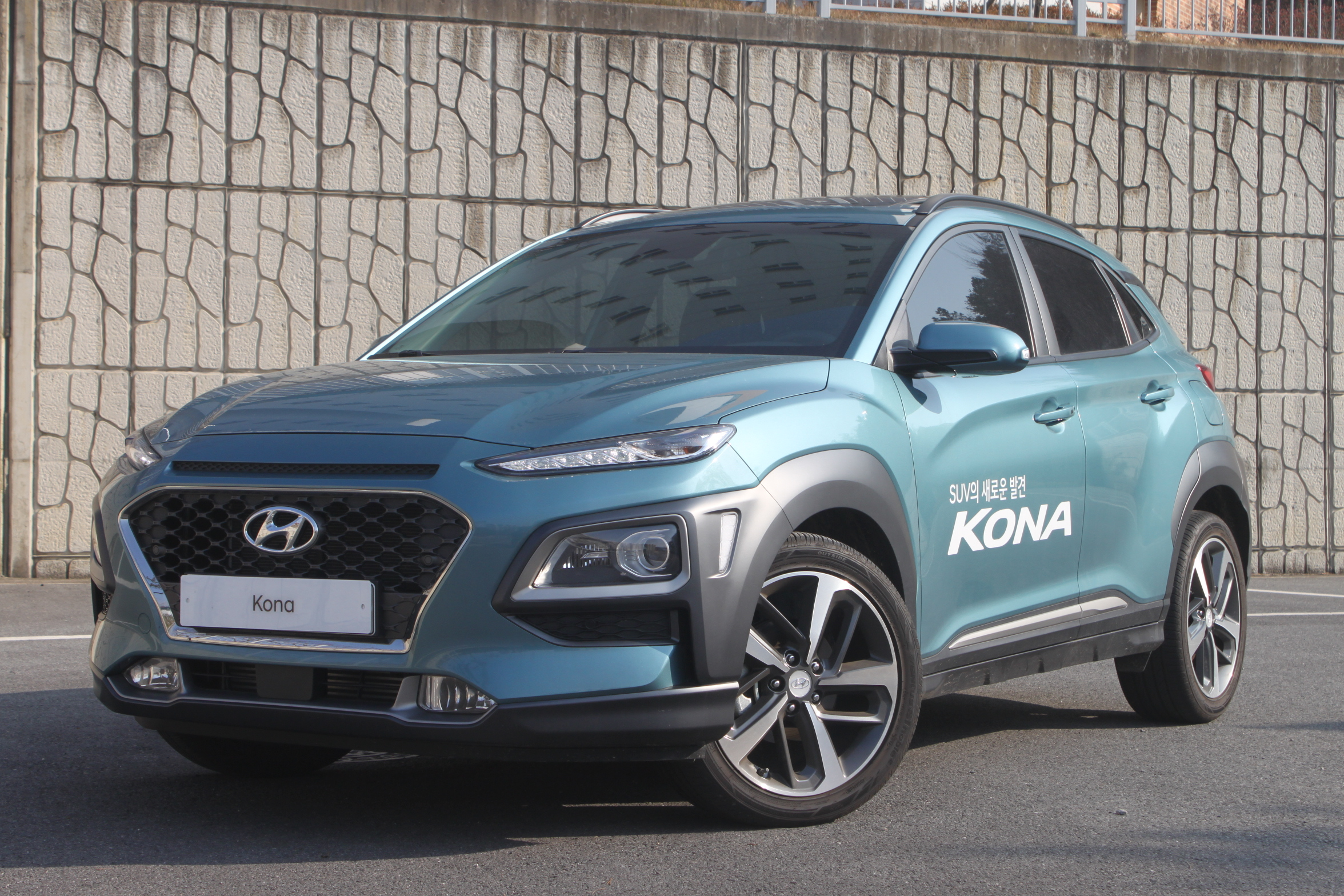 현대 코나 정측면